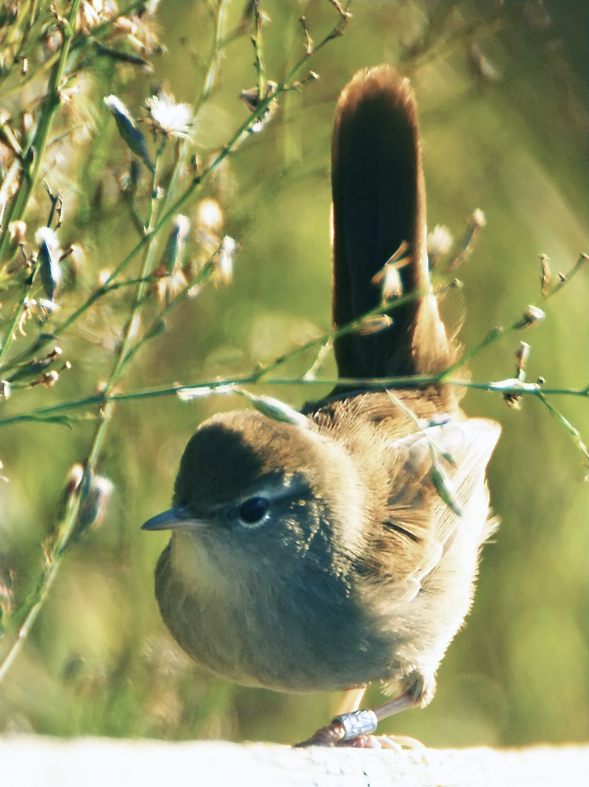 Rossinyol bord - Ruiseñor Bastardo Cettia cetti, Remolar, Llobregat Delta, Barcelona, Catalunya, Spain